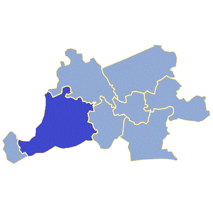 Powiat gorzowski - Gmina Witnica